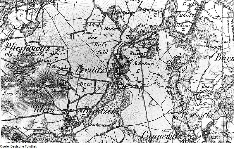 Original image description from the Deutsche Fotothek Malschwitz-Preititz. Oberreit, Sect. Bautzen, 1844/46